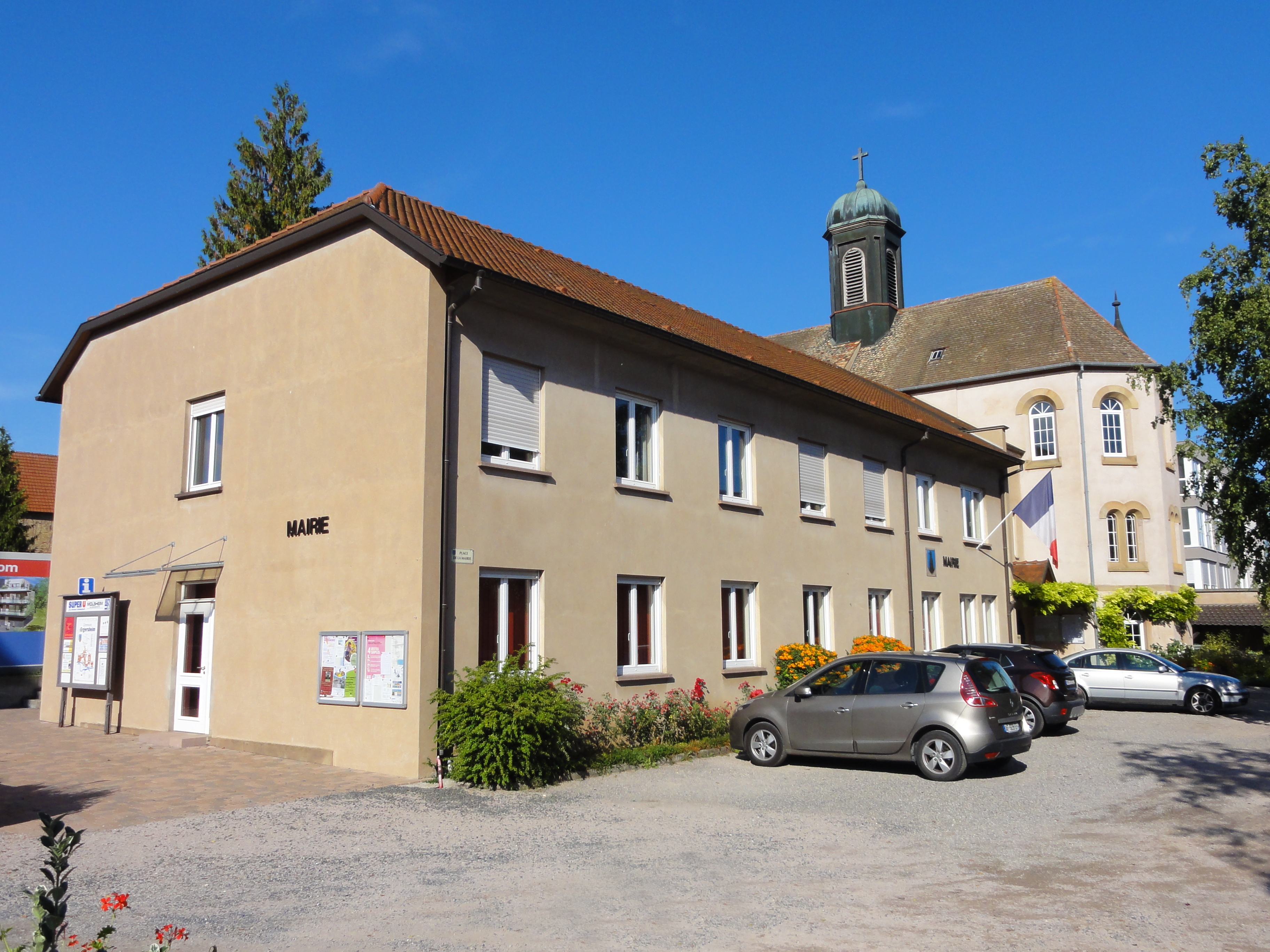 Alsace, Bas-Rhin, Ergersheim, Ancien couvent de trappistines Notre-Dame d'Altbronn (XIXe), actuellement mairie, bâtiments municipaux et logements, 16 rue Principale (IA67011804).